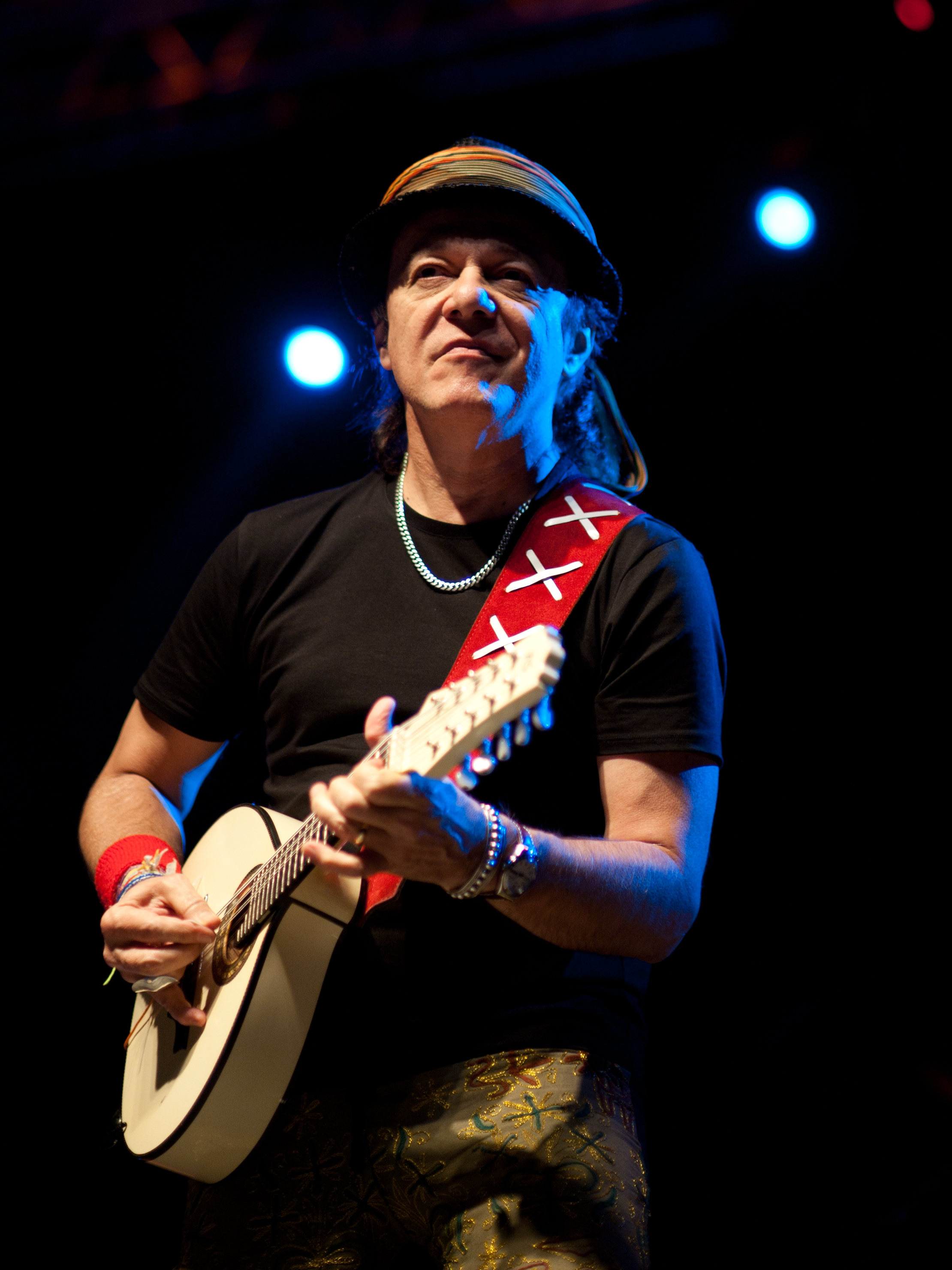 Show e recepção oferecido pelo GDF Músico Armandinho (BA) Foto: Pedro França/MinC